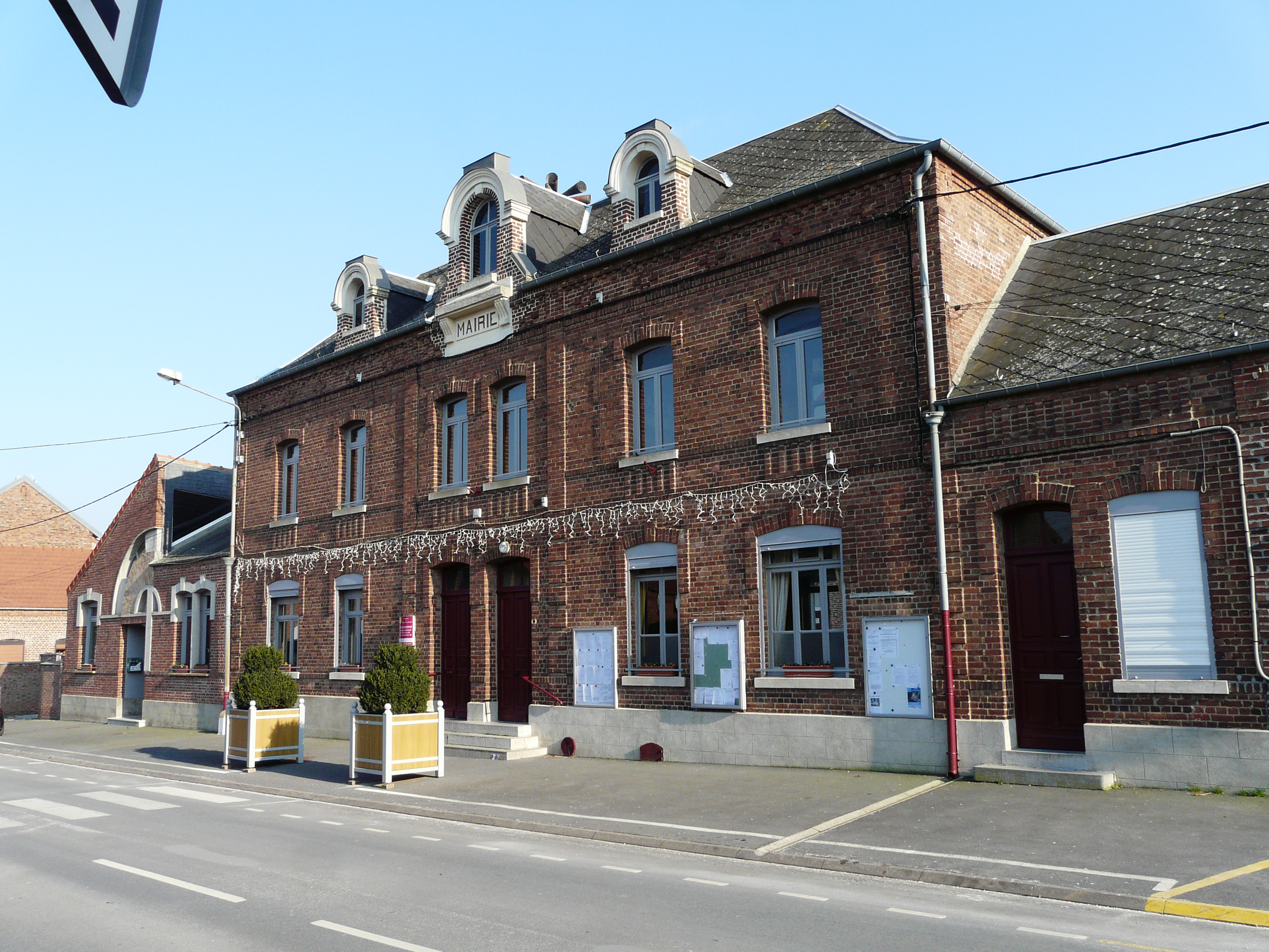 La mairie de Rumilly-en-Cambrésis